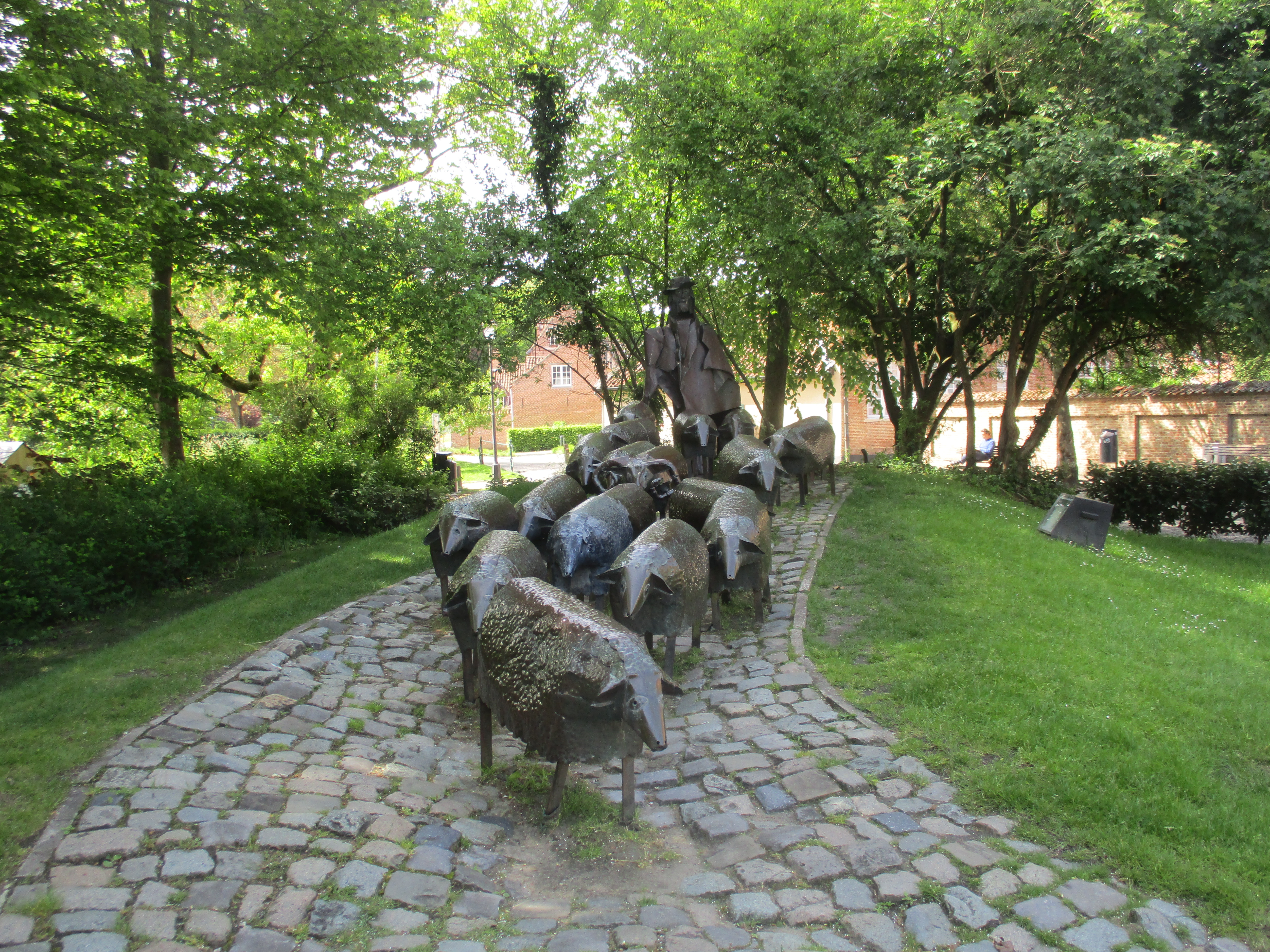 Schapenkoppenmonument